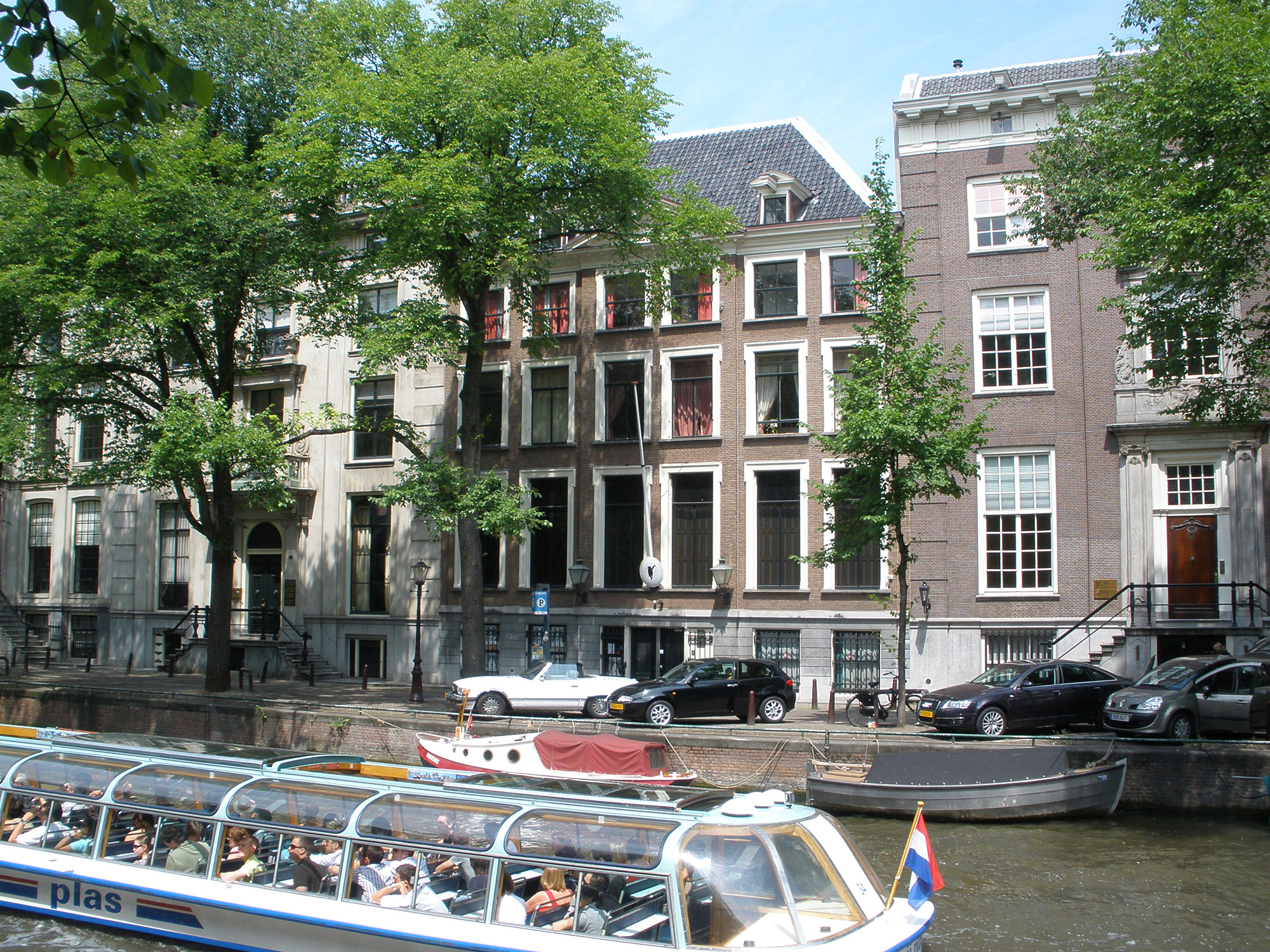 The KattenKabinet museum in Amsterdam